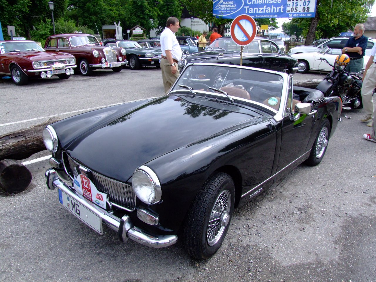 MG Midget